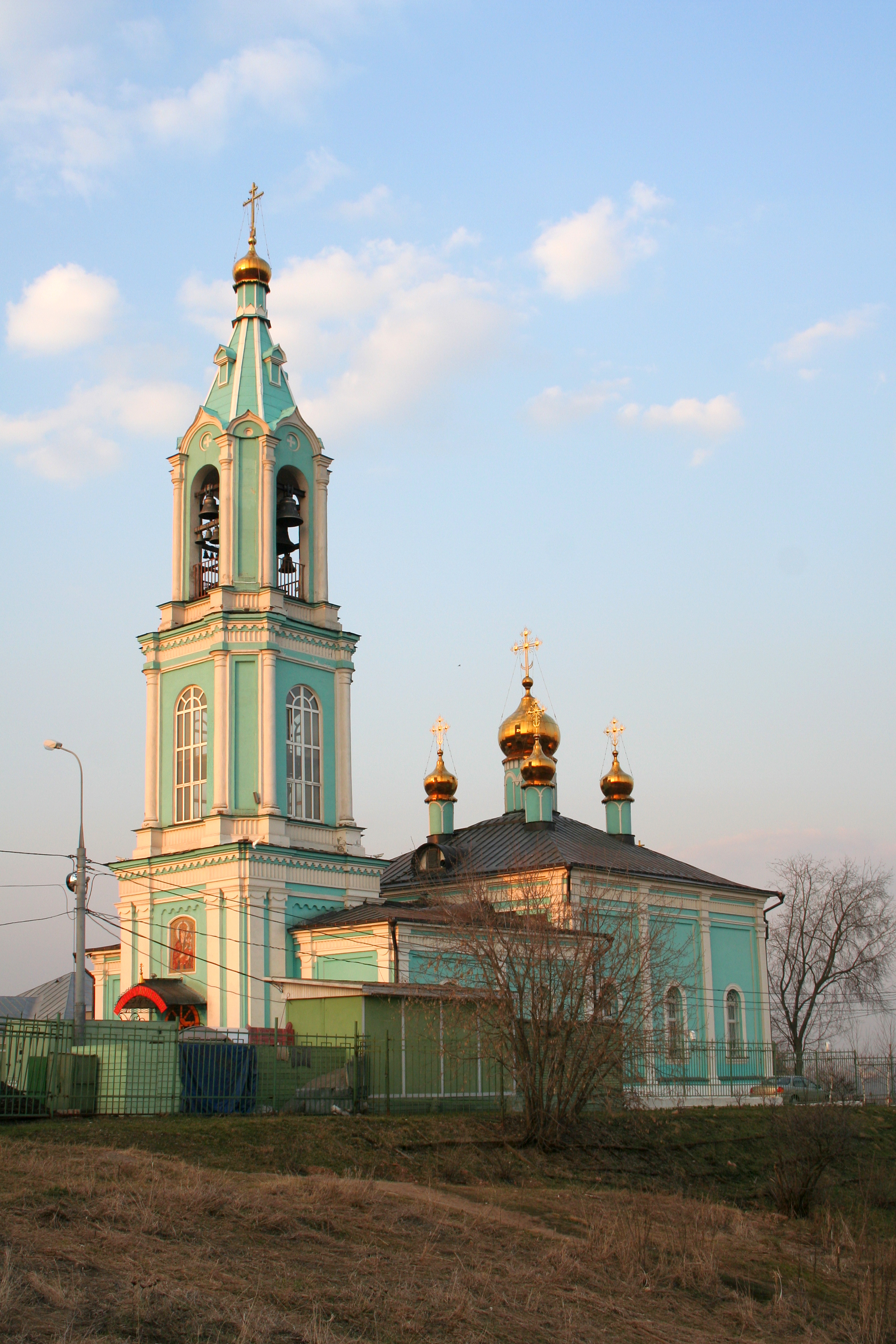 Mariä-Geburts-Kirche in Krylatskoje, Moskau